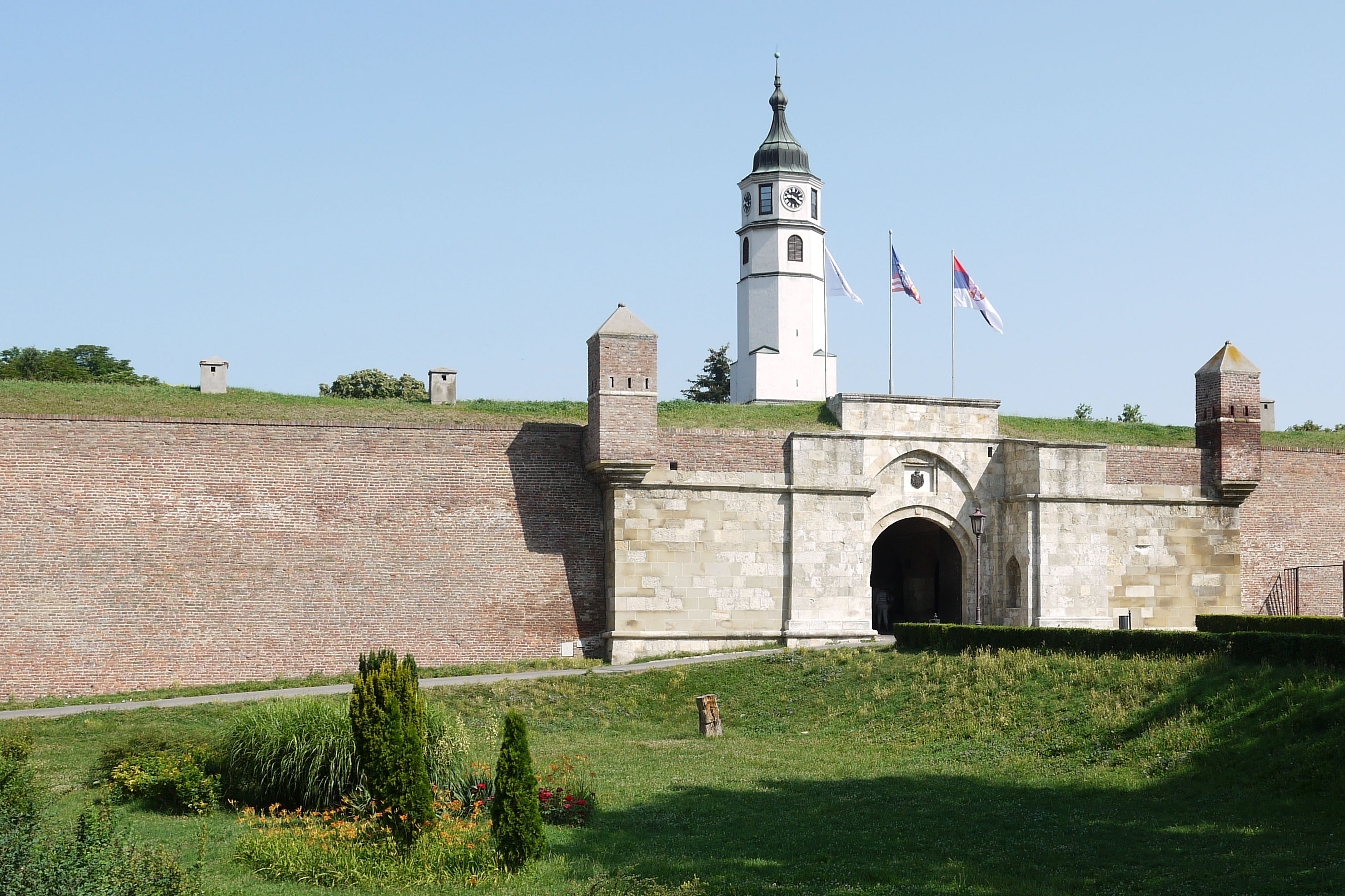 Eingang zum inneren Bereich der Festung Belgrad